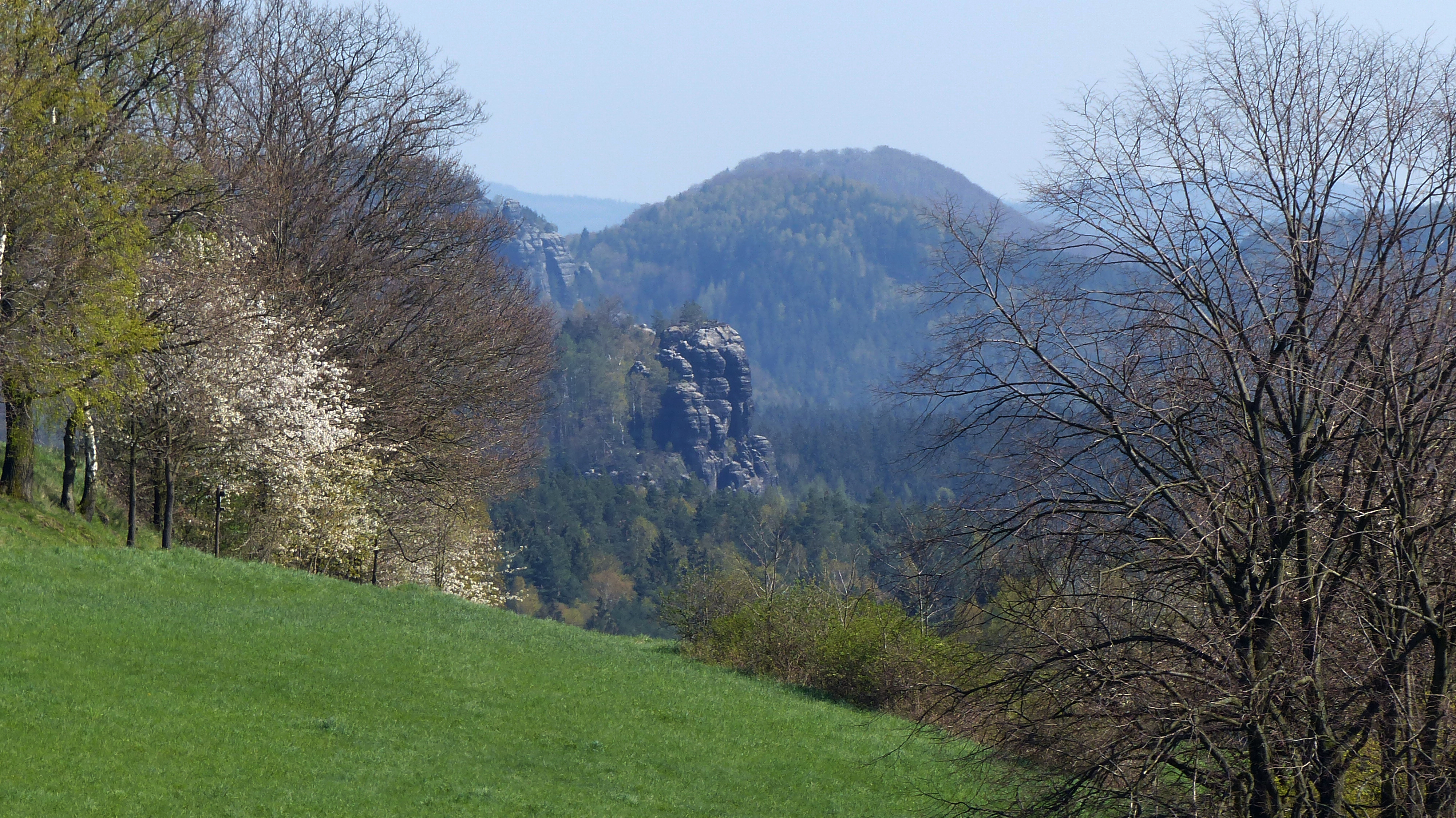 Blick auf den Raumberg (459 m) in der Sächsischen Schweiz, von Norden (Mittelndorf) aus; davor: Hochhübel (406 m); links davor: Neuer Wildenstein (mit Kuhstall) und dahinter Lorenzsteine